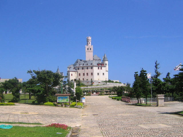 Ueno German Culture Village in Miyakojima, Okinawa, Japan.